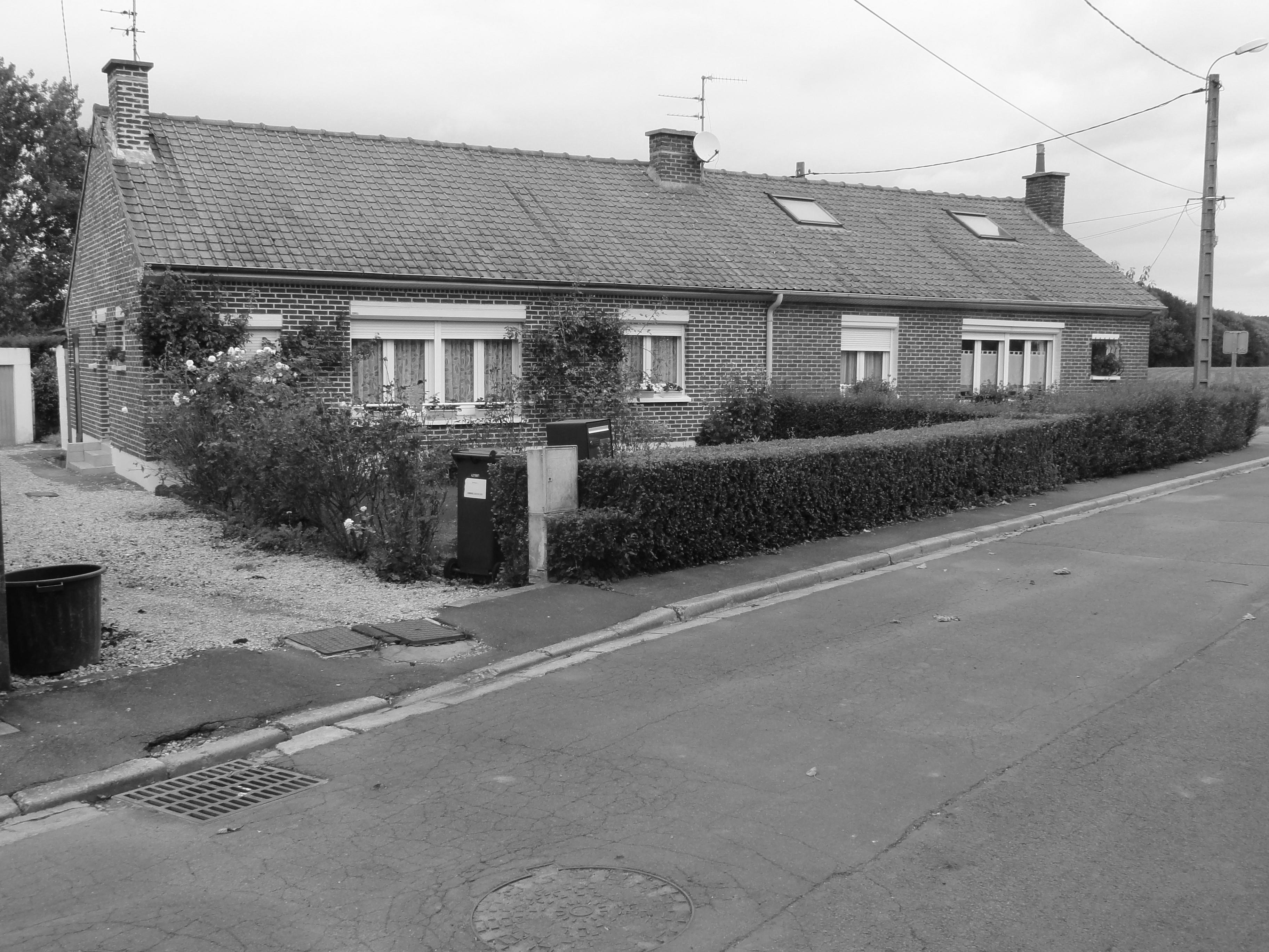 Cité de la Fosse n° 13 bis de la Compagnie des mines de Lens, Bénifontaine, Pas-de-Calais, Nord-Pas-de-Calais, France.